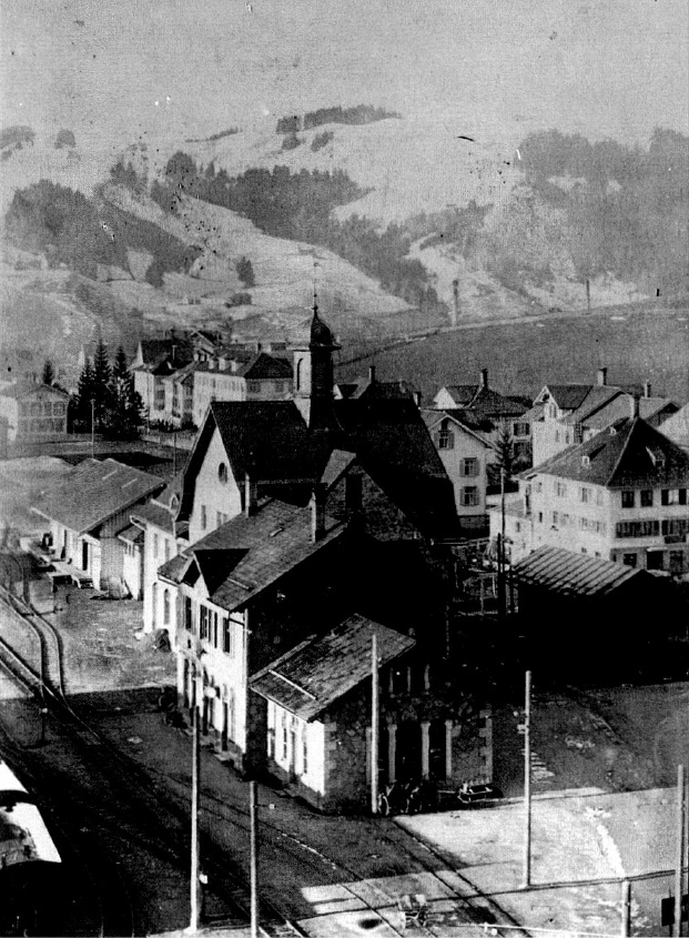 In Gais waren die Arbeiten für das neue Stationsgebäude im Frühling 1912 weitgehend beendet.